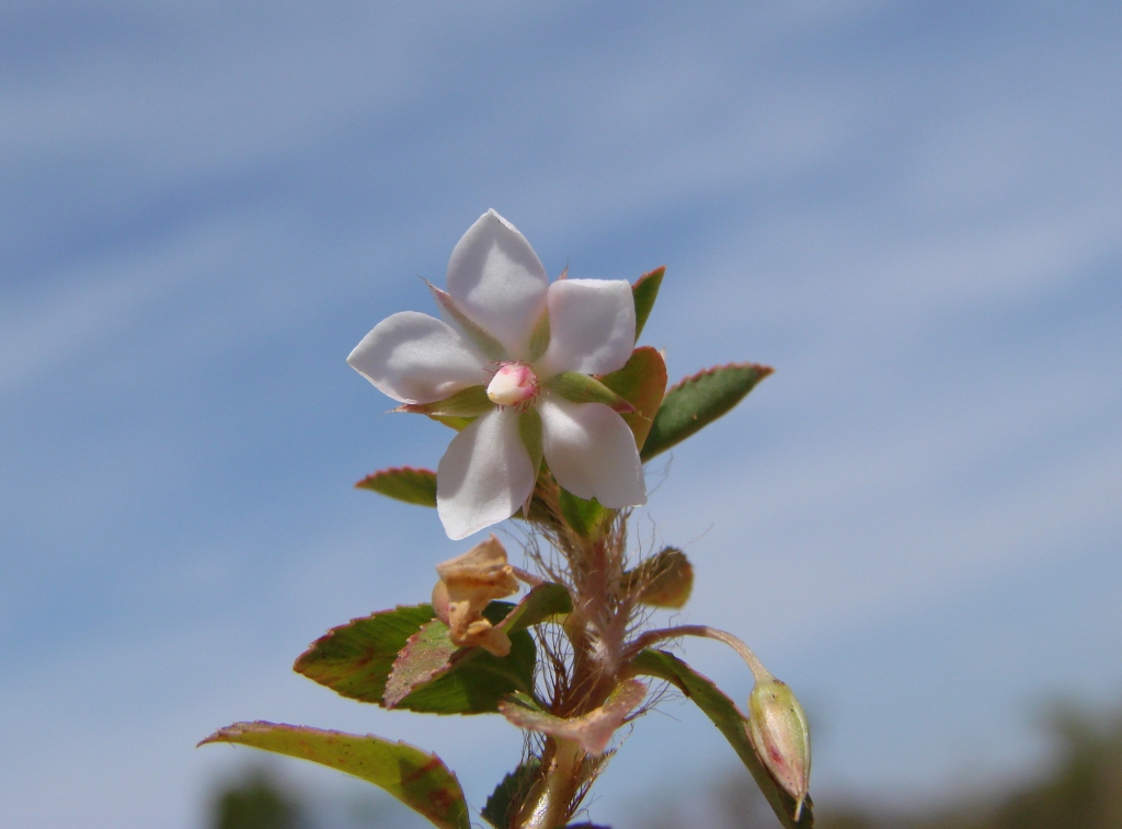 Sauvagesia erecta - OCHNACEAE - Parque Nacional de Brasília - Distrito Federal - Brasil.